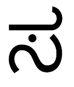 сакараву